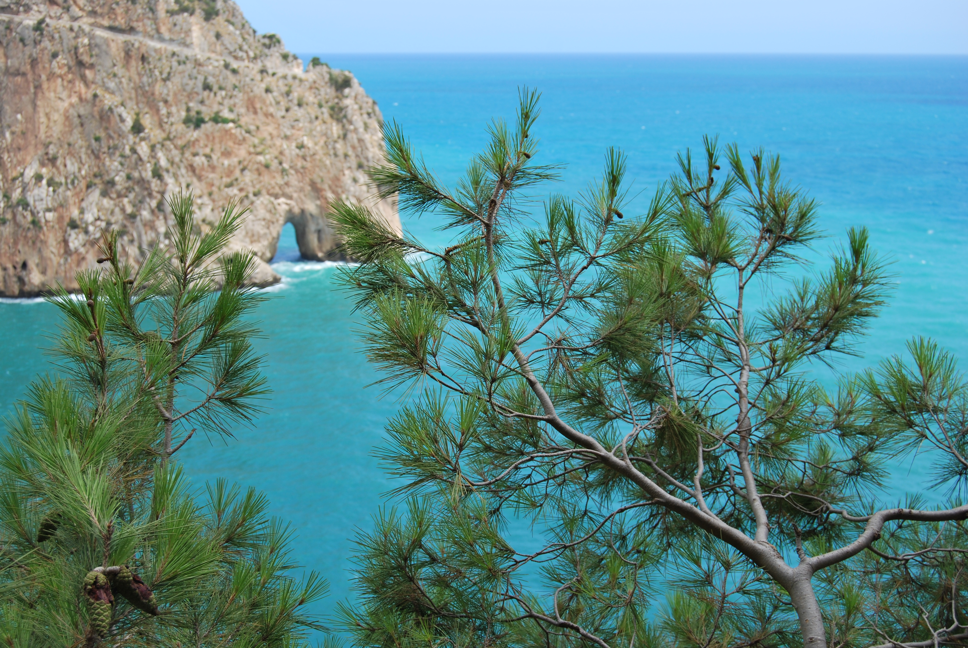 Pin d'Alep Pinus halepensis, Béjaïa, Algerie